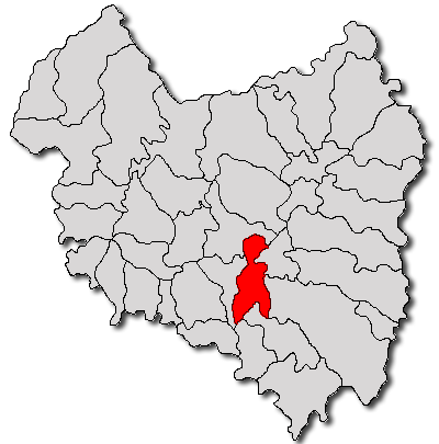 Categorie:Hărţi ale judeţului Covasna